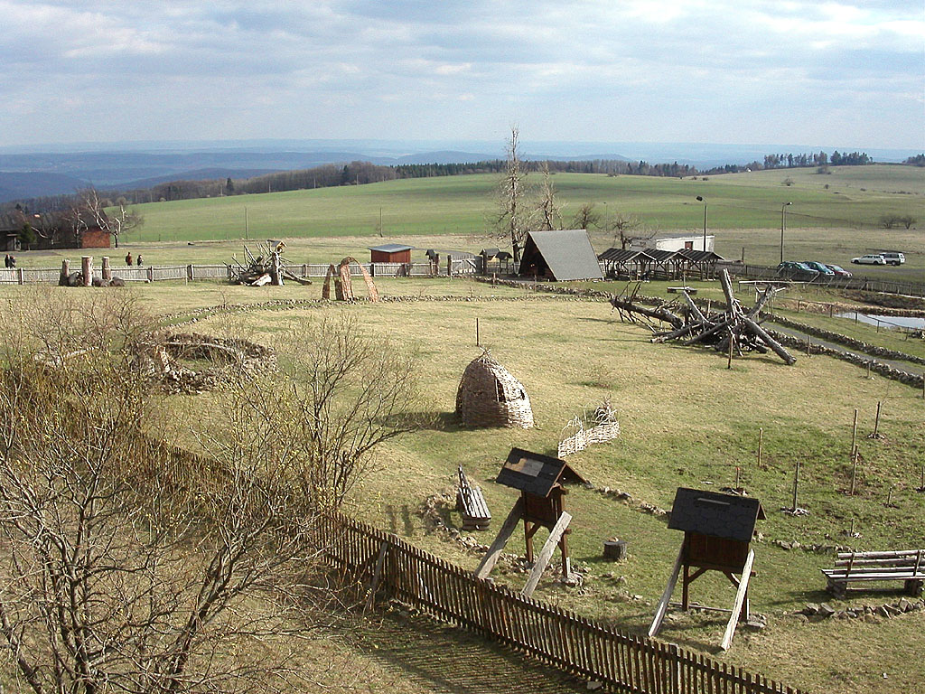 Auf der Geba in der thüringischen Rhön: Keltendorf